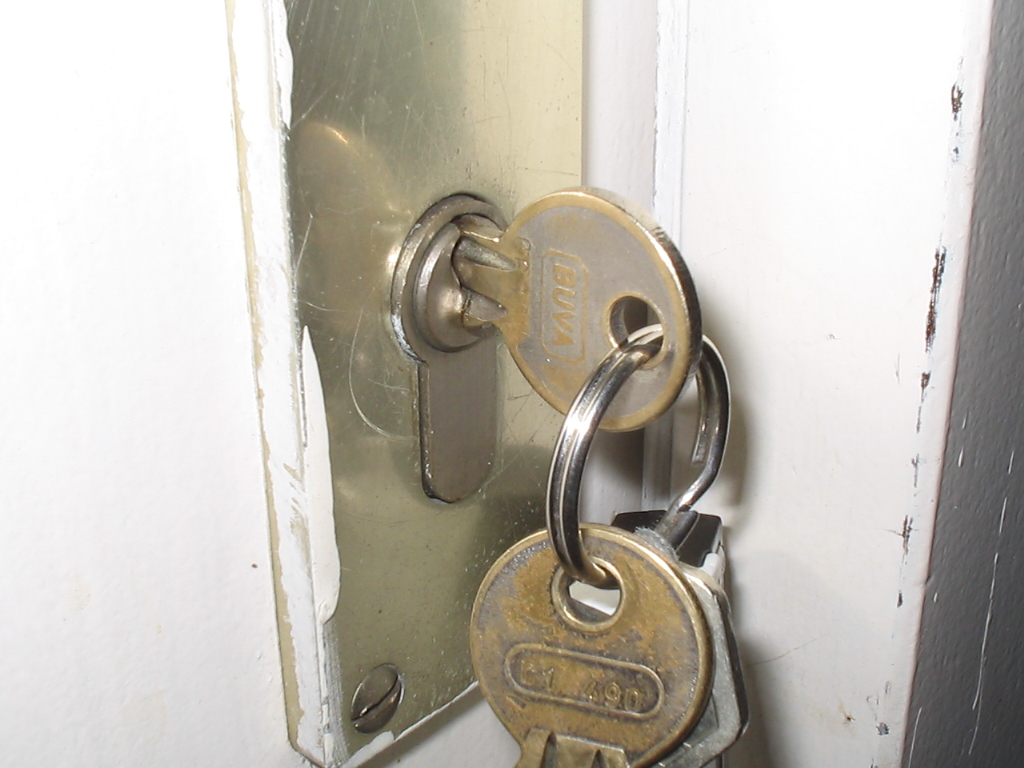 Deurslot Categorie:Wikipedia:Afbeeldingen/Gebruiker:Michiel1972